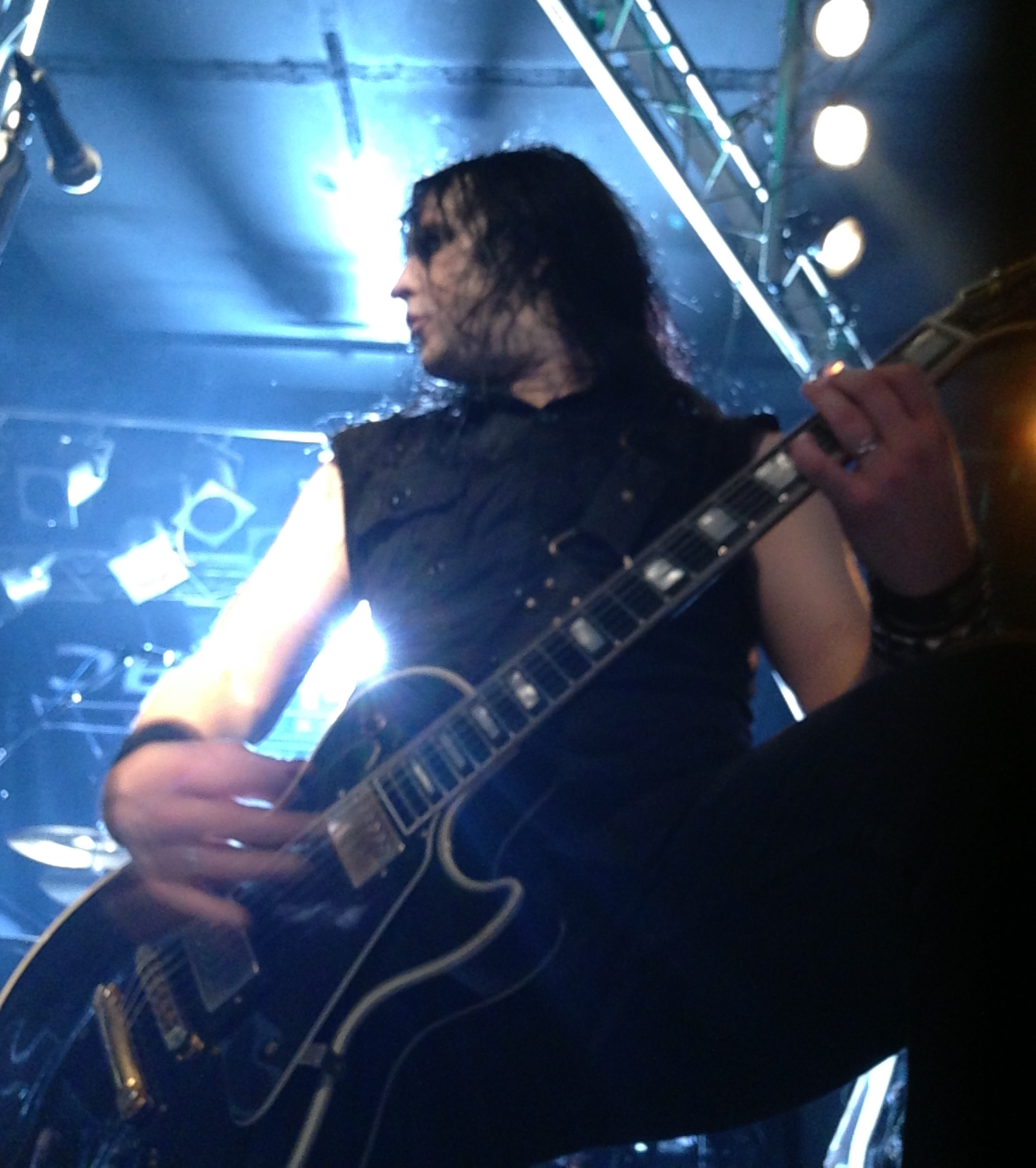 Emil Nödtveidt alias Nightmare Industries Biebob Vosselaer 01-11-2014